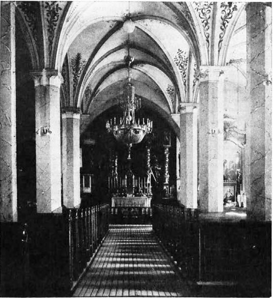 Leskovec pri Krškem; župna cerkev.